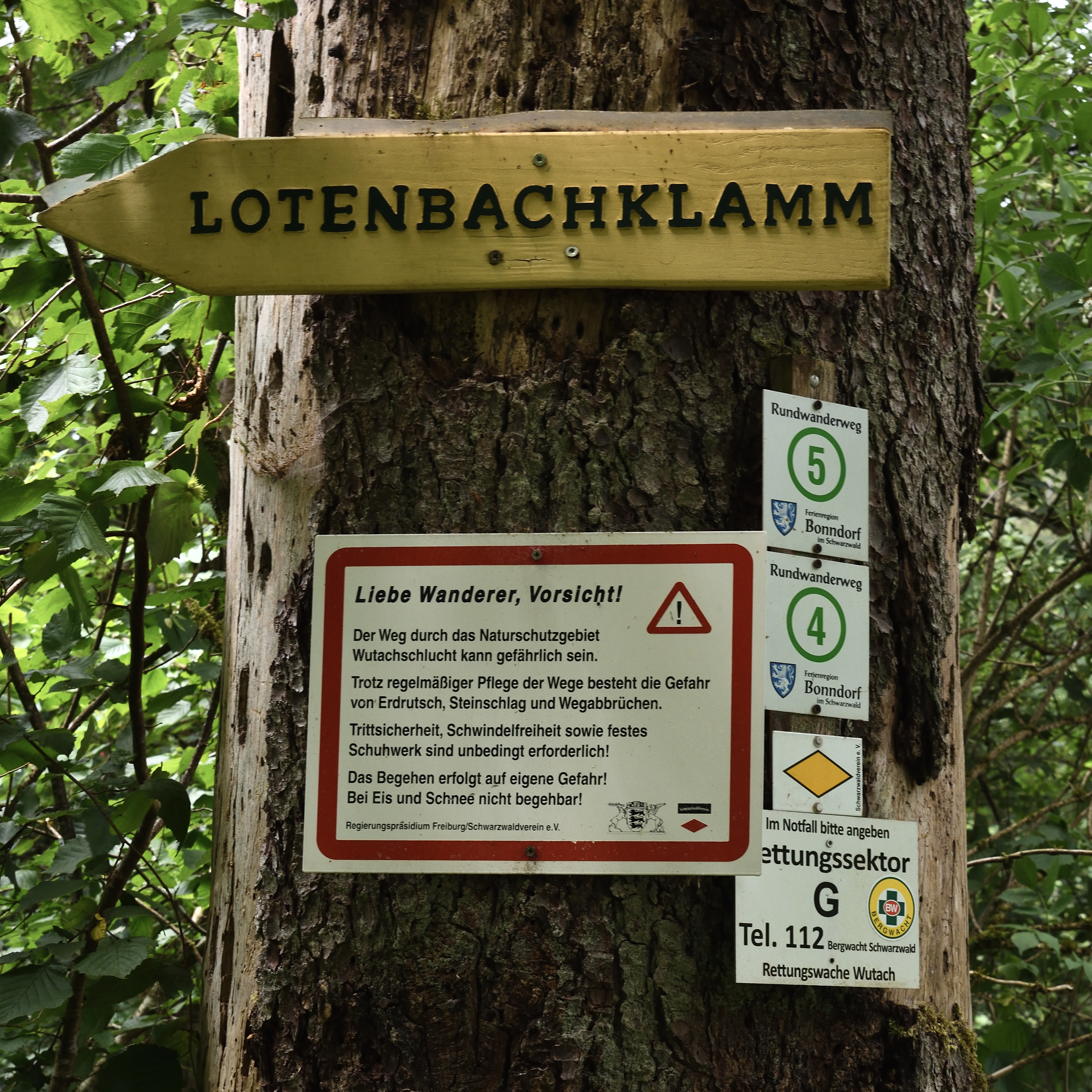 Wegweiser mit Warnschild am unteren Zugang zur Lotenbachklamm